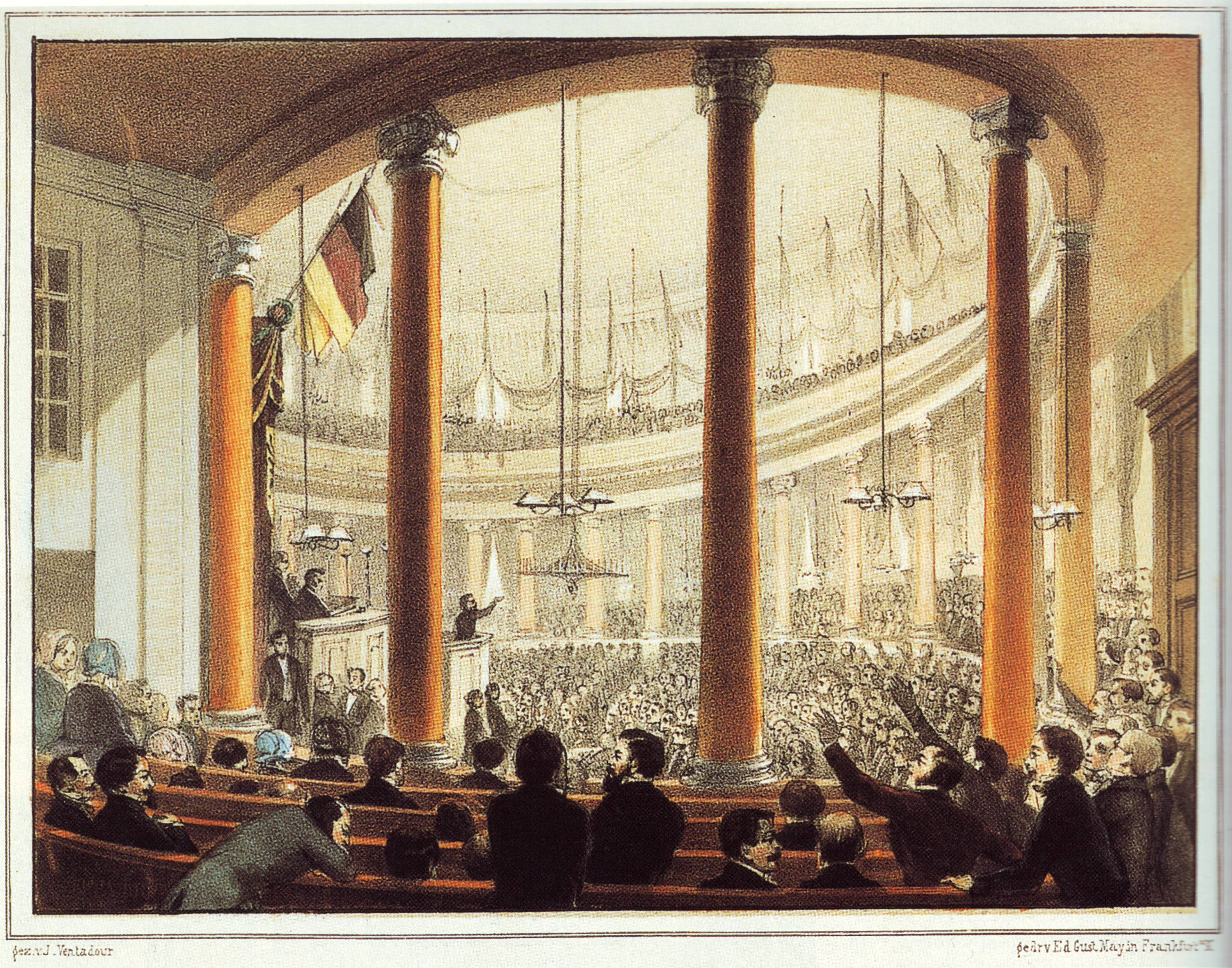 Farblithographie, Jean Nicolas Ventadour, 1848. Druck: Eduard Gustav May, Frankfurt am Main. “Die innere Ansicht der Paulskirche in Frankfurt aM”